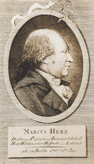 Stich des Arztes und Philosophen Marcus Herz.